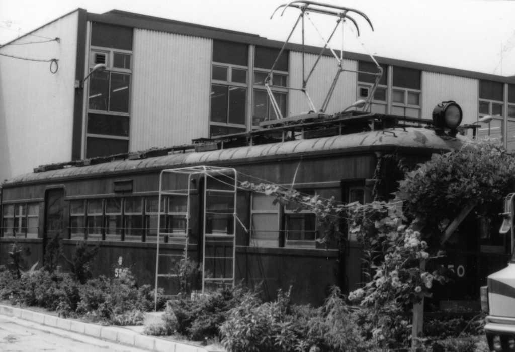 ナニワ工機が製造した第一号車の550